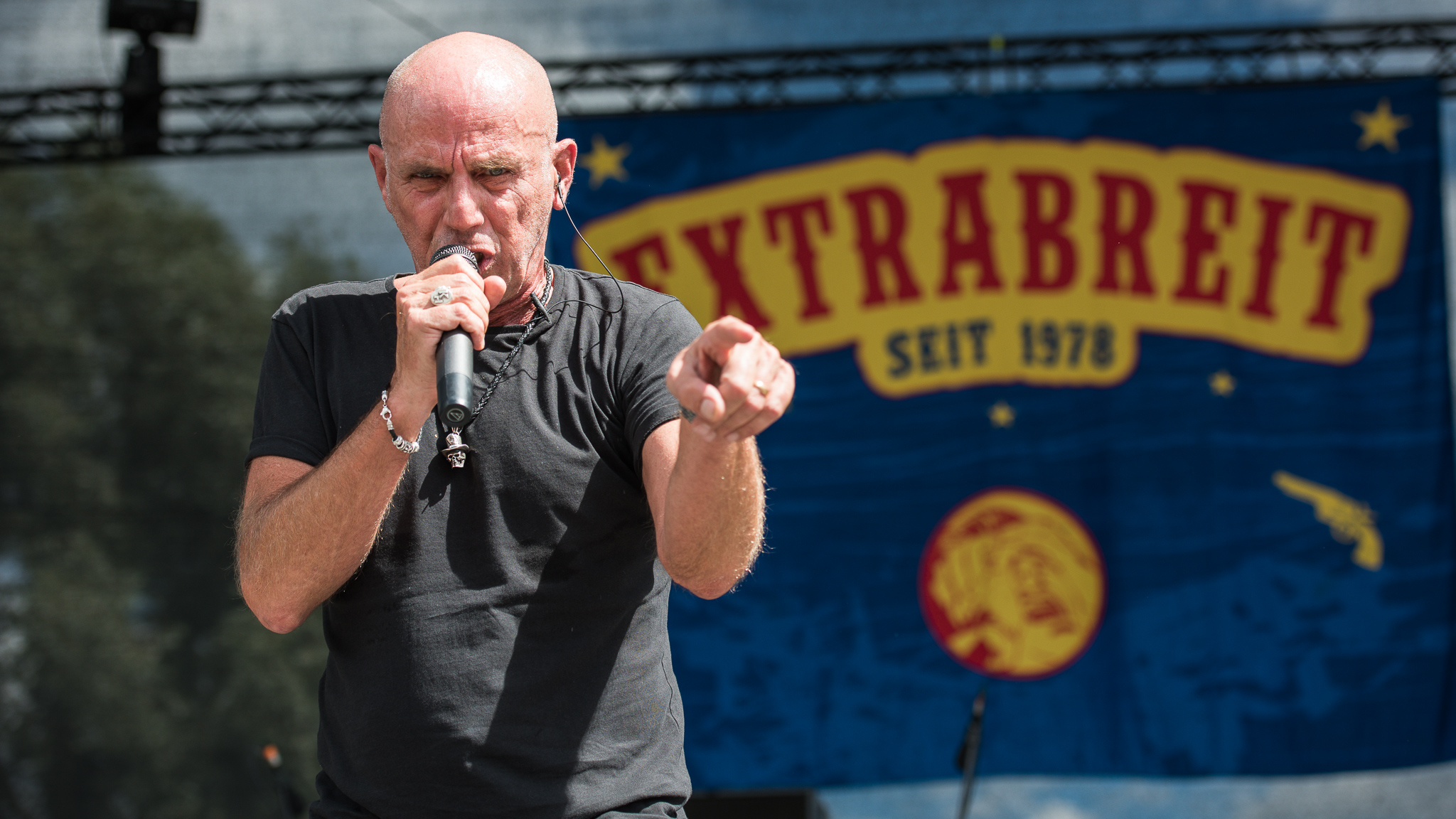 Brombachsee,Concertbüro Franken,Extrabreit,Festival,Kai Havaii,Kay Schlasse,Konzert,Lieder am See,Livekonzert,Livemusik,Musik